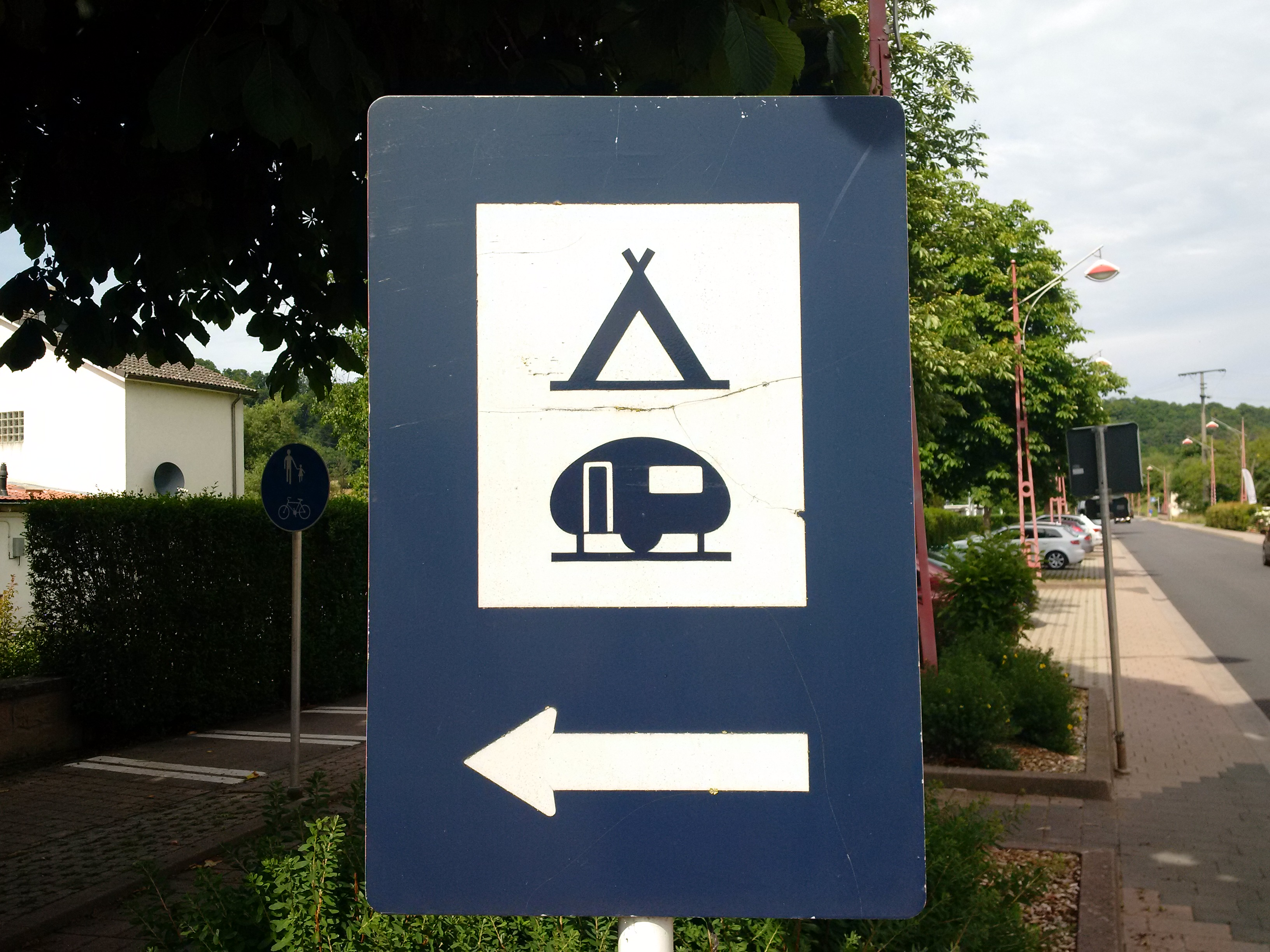 Verkéiersschëld F, 12 "Terrain de camping et de caravaning" aus dem lëtzebuerger Code de la Route